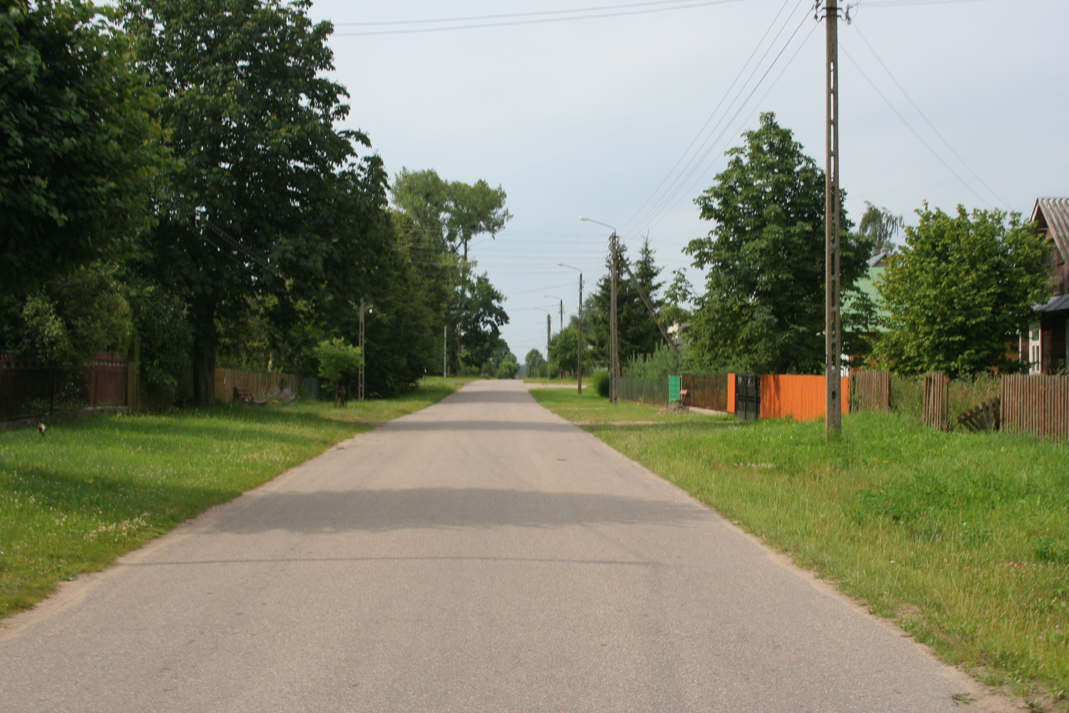 Droga przez Dubicze Osoczne.